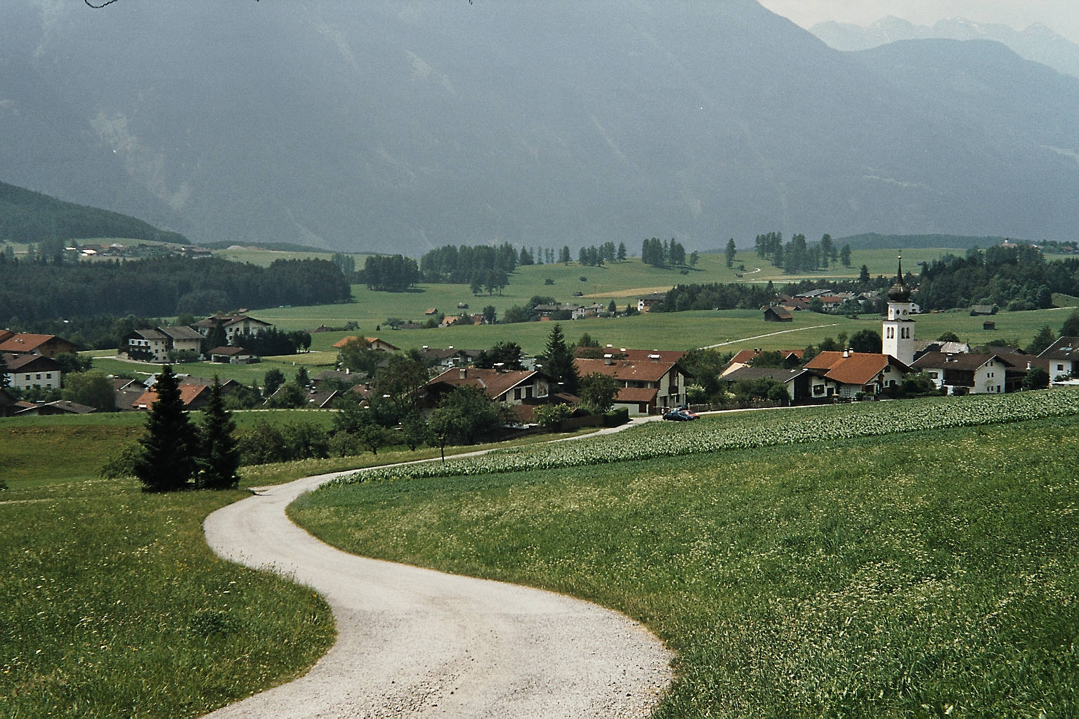 Blick auf Wildermieming